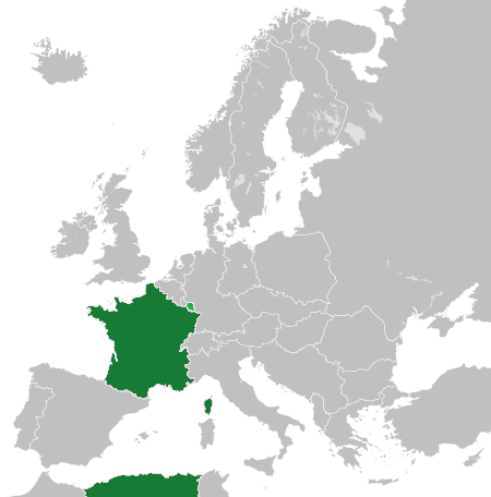 La Francia tra il 1946 e il 1957, con il protettorato del Saarland. Qui la versione 1945-1949